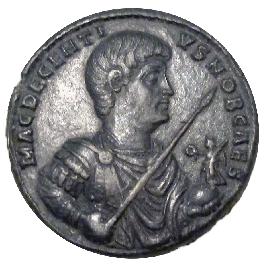 Impero, decenzio, medaglione in bronzo (roma), 350-353